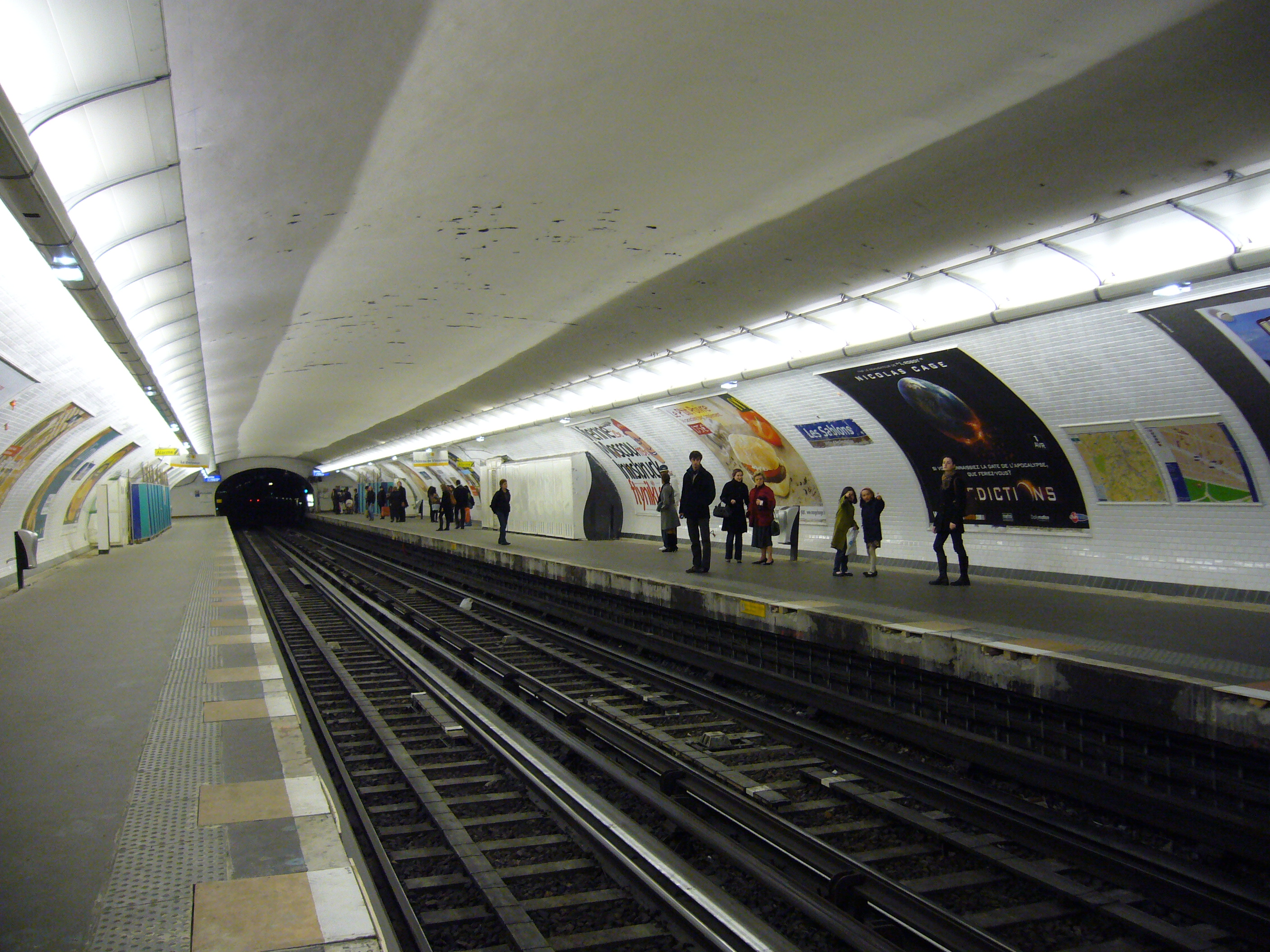 Les quais de la station Les Sablons sur la ligne 1 du métro de Paris.